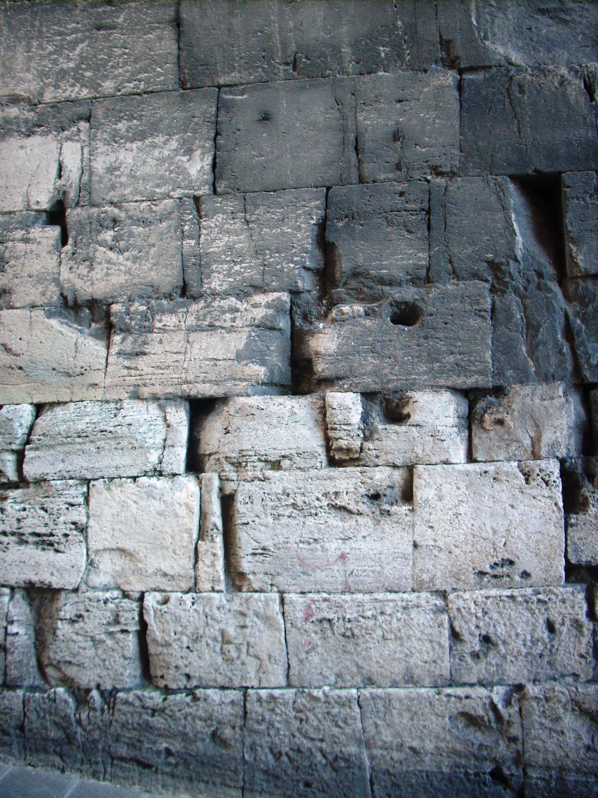 Scorcio delle mura etrusche nell'Arco Etrusco